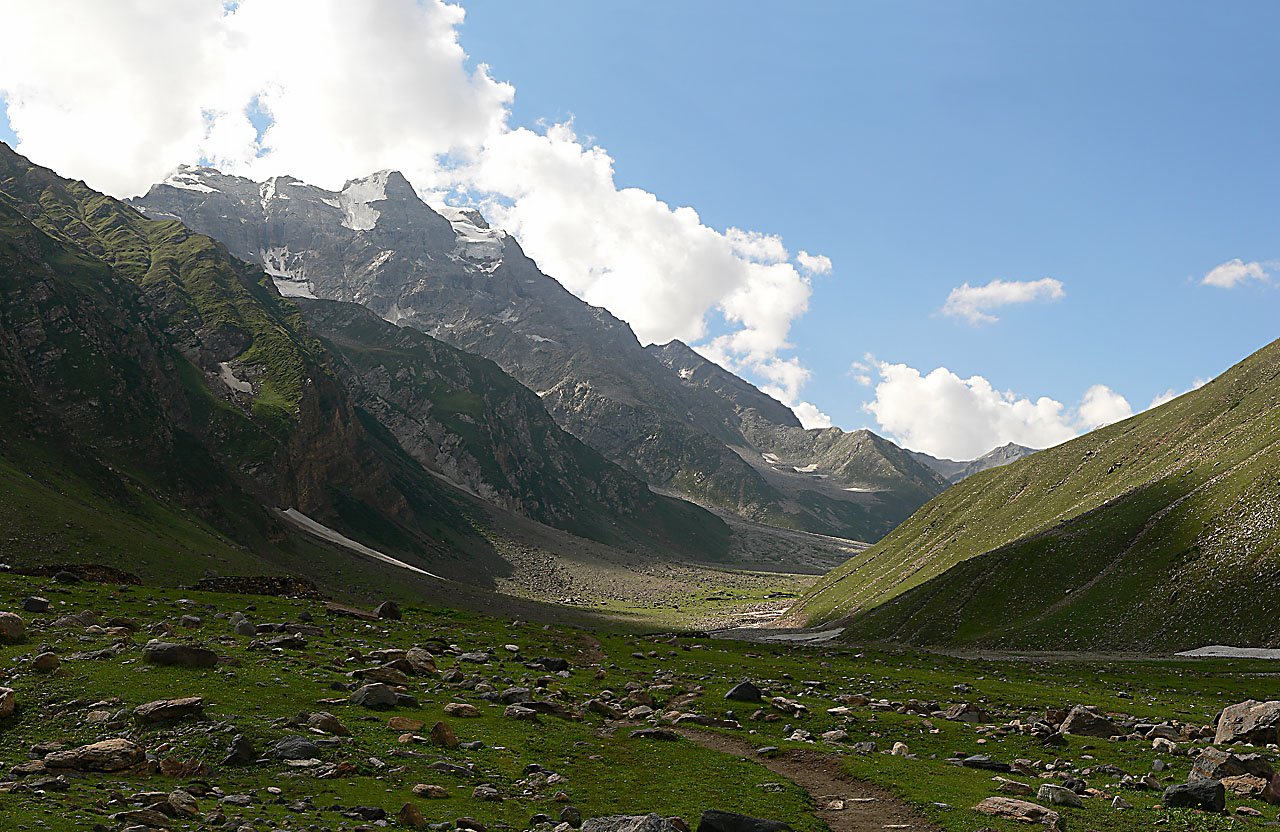 Malika Parbat (5,190 m), near Lake Saiful Muluk, Kaghan Valley, NWFP, Pakistan